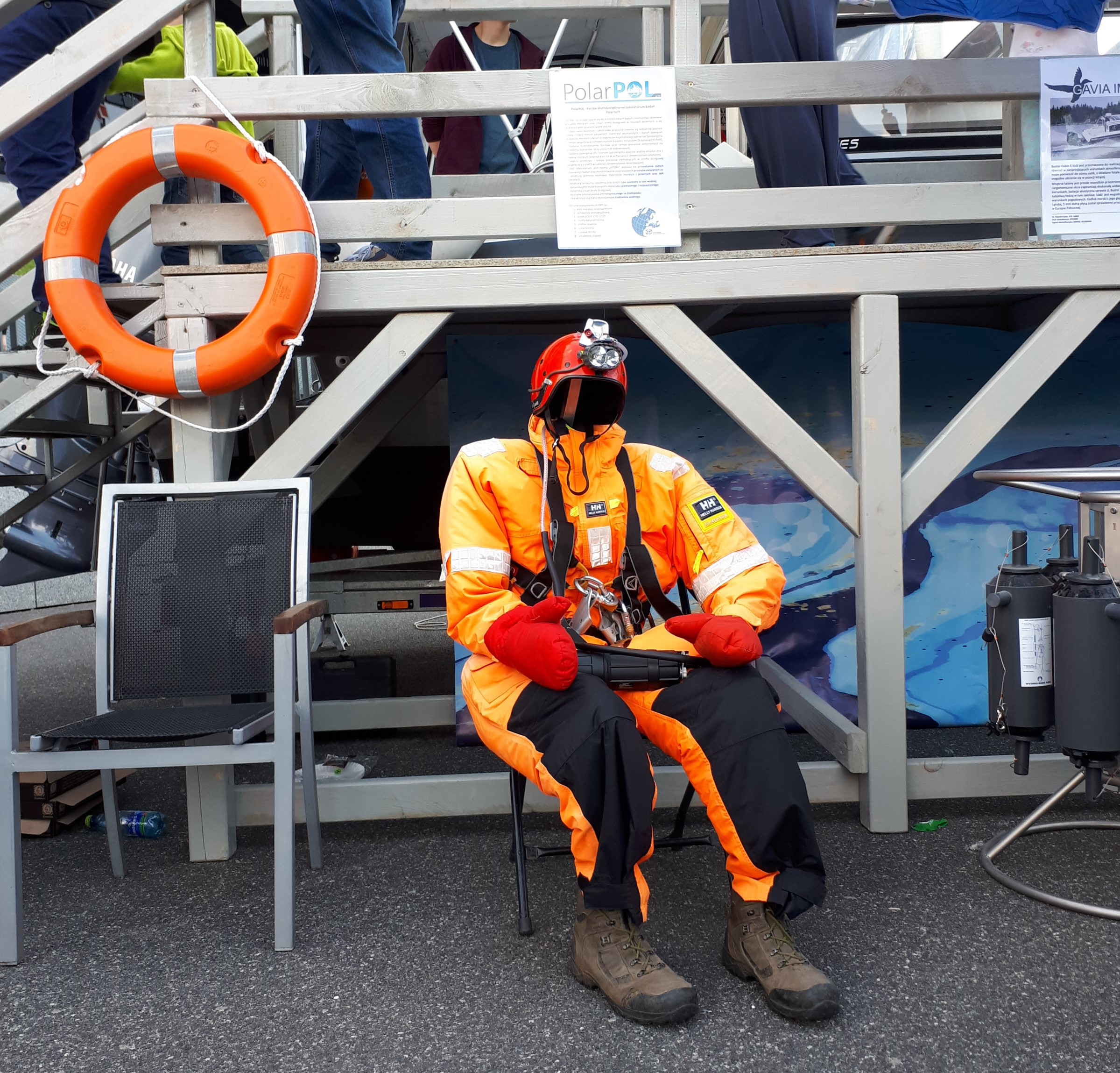 PolarPOL i Instytut Geofizyki PAN. Centrum Nauki Kopernik, Polskie Radio - 23. Piknik Naukowy 2019